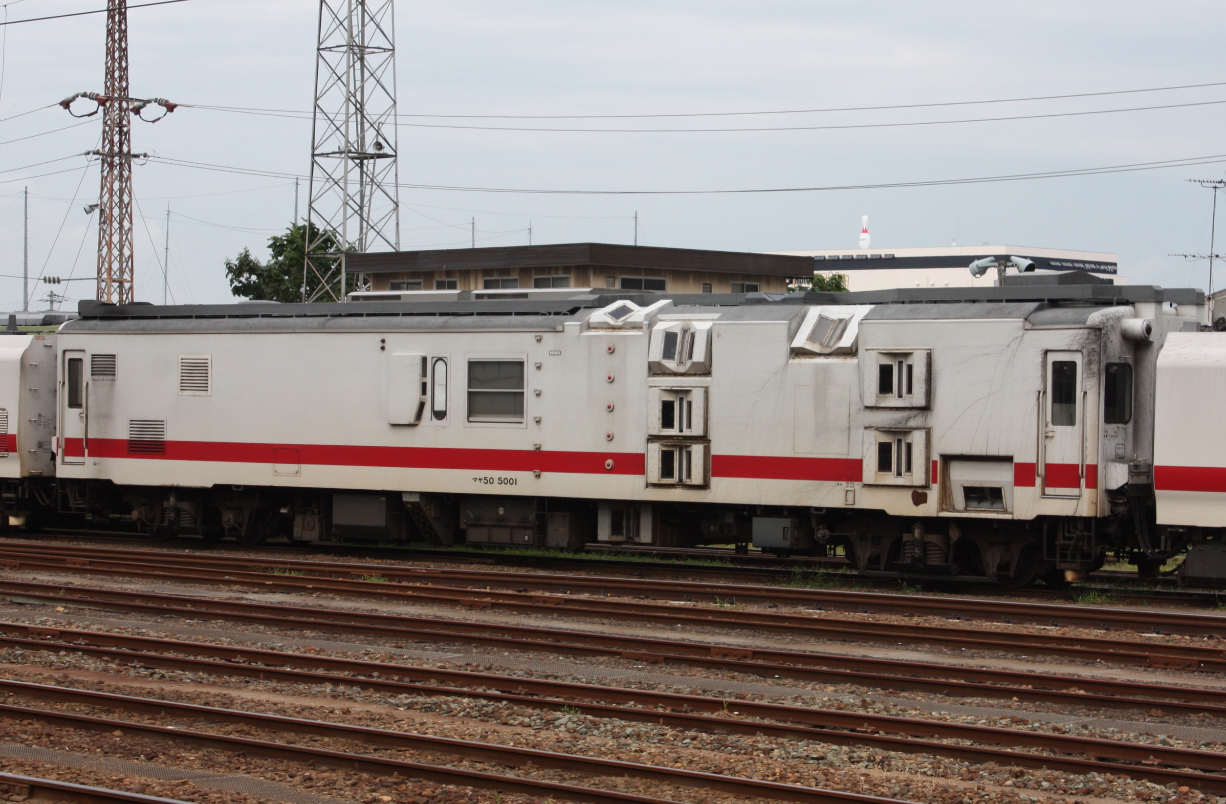 マヤ50-5001 郡山にて